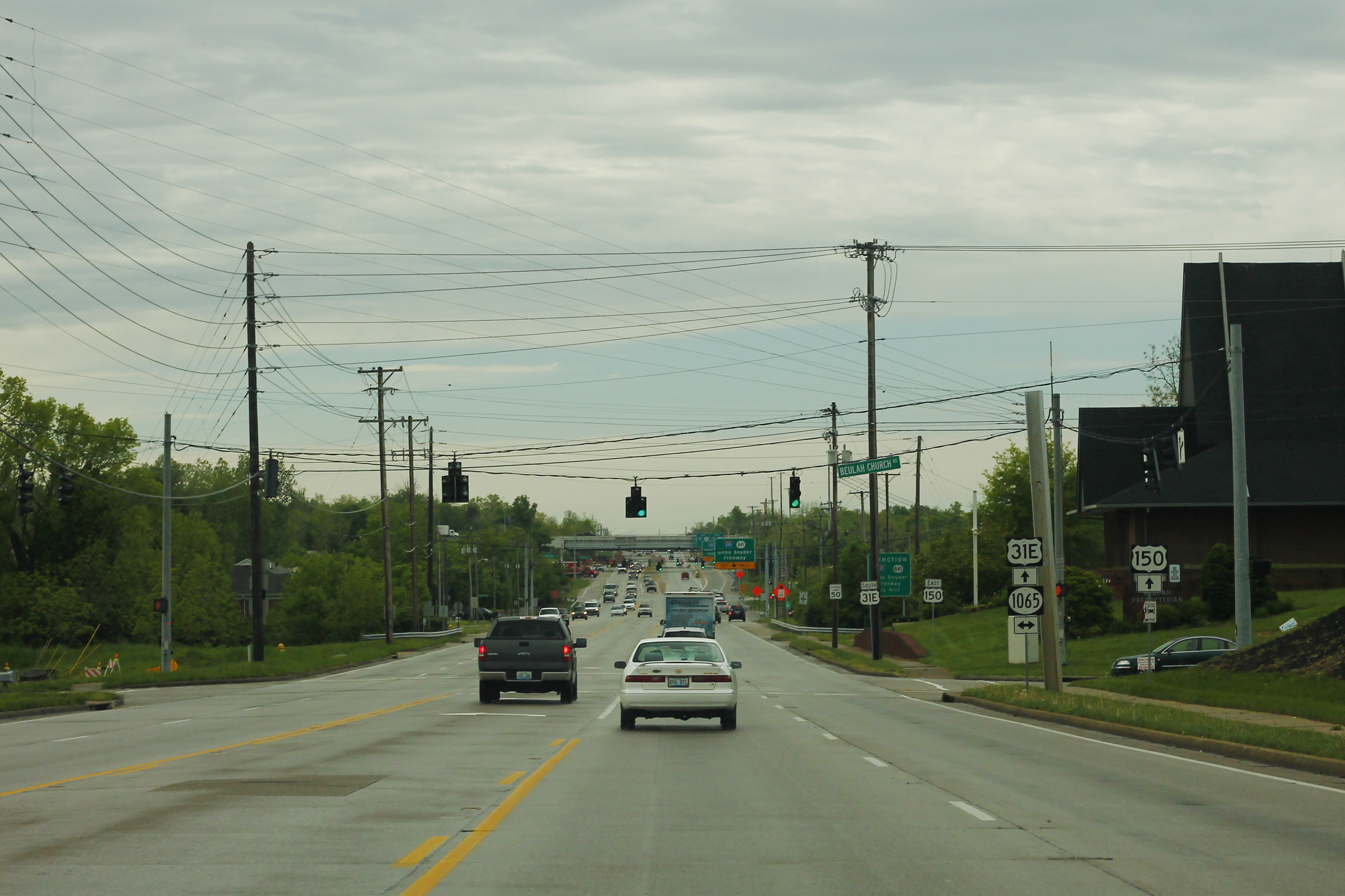 US31EsUS150sRoad-KY1065signs